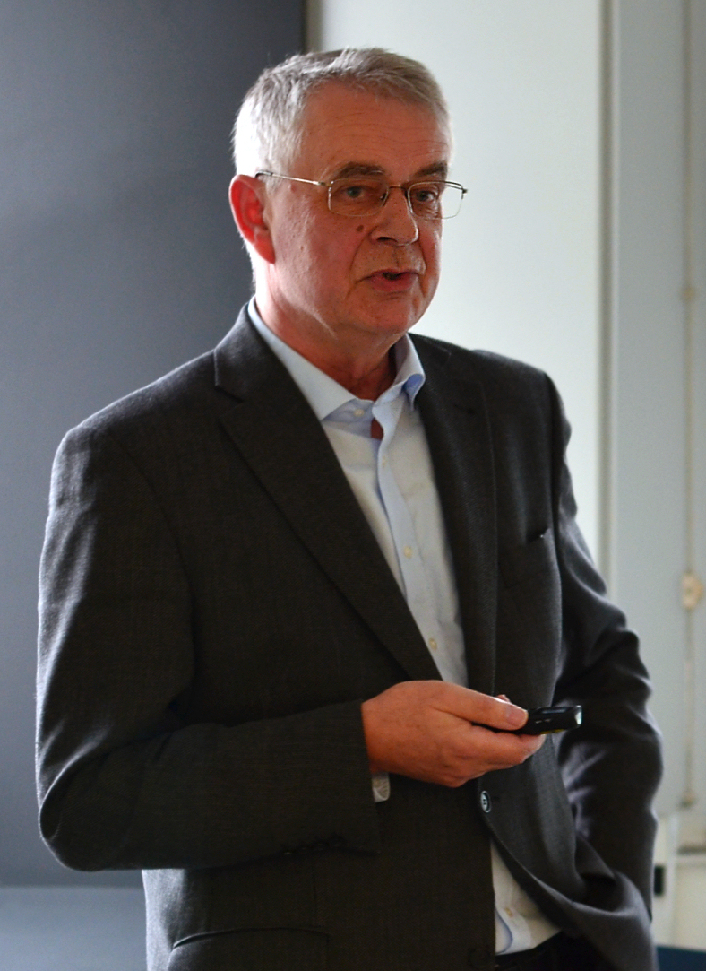 Bernd Kluge im Kestner Museum Hannover bei einem Vortrag bei der Numismatischen Gesellschaft zu Hannover über einen Braketeten-Fund in Bessarabien